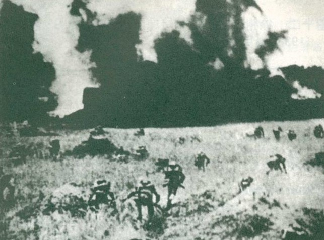 中文（中国大陆）: 国军徐州突围